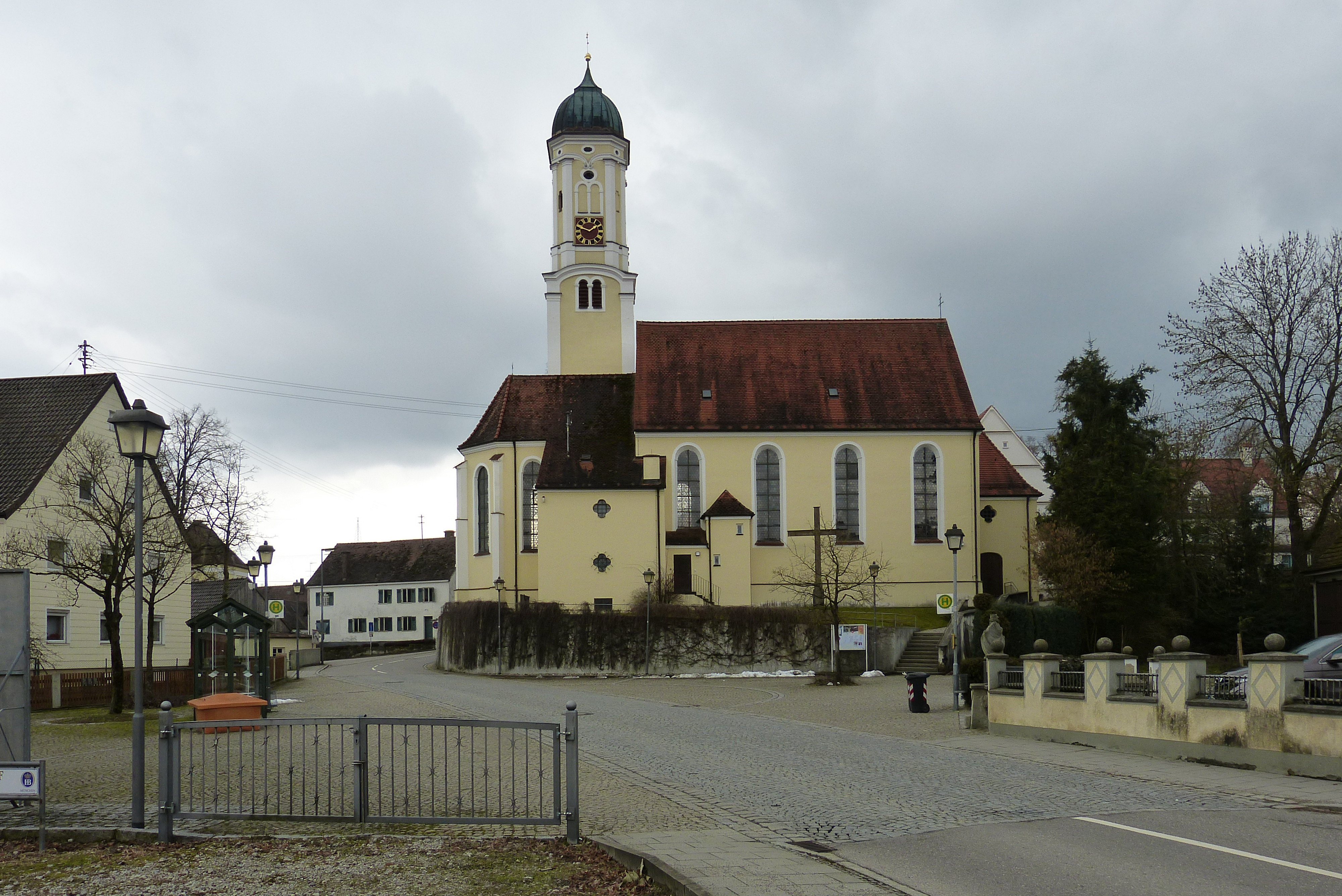 Batzenhofen, Pfarrkirche St. Martin. This is a photograph of an architectural monument.